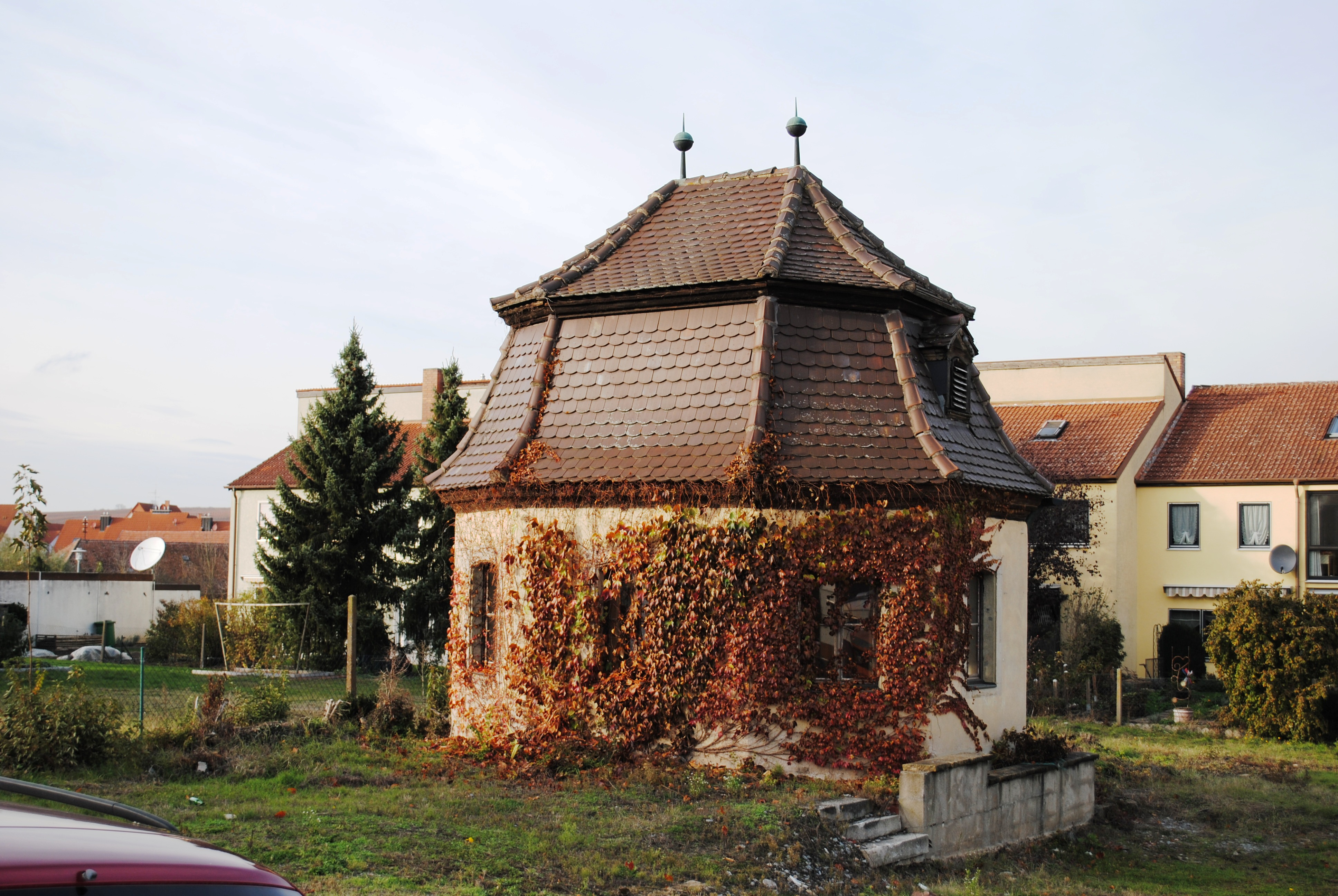 Gartenhäusschen, Engertstraße 3, Volkach, über oktogonalem Grundriß mit Mansarddach, Mitte 18. Jahrhundert, stark überformt; D-6-75-174-16